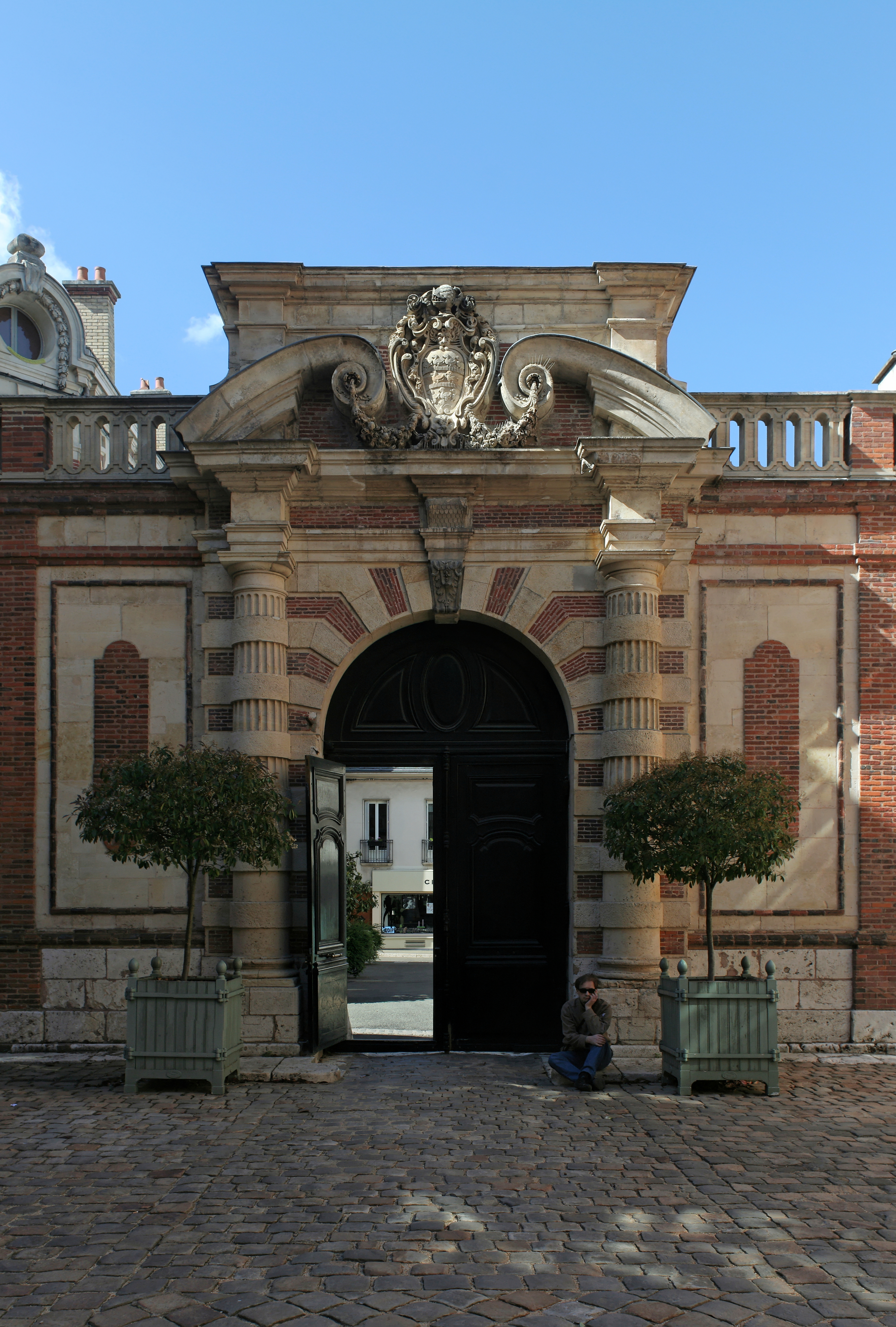 Chartres, hôtel Montescot : porte monumentale sur rue, vue depuis la cour. .